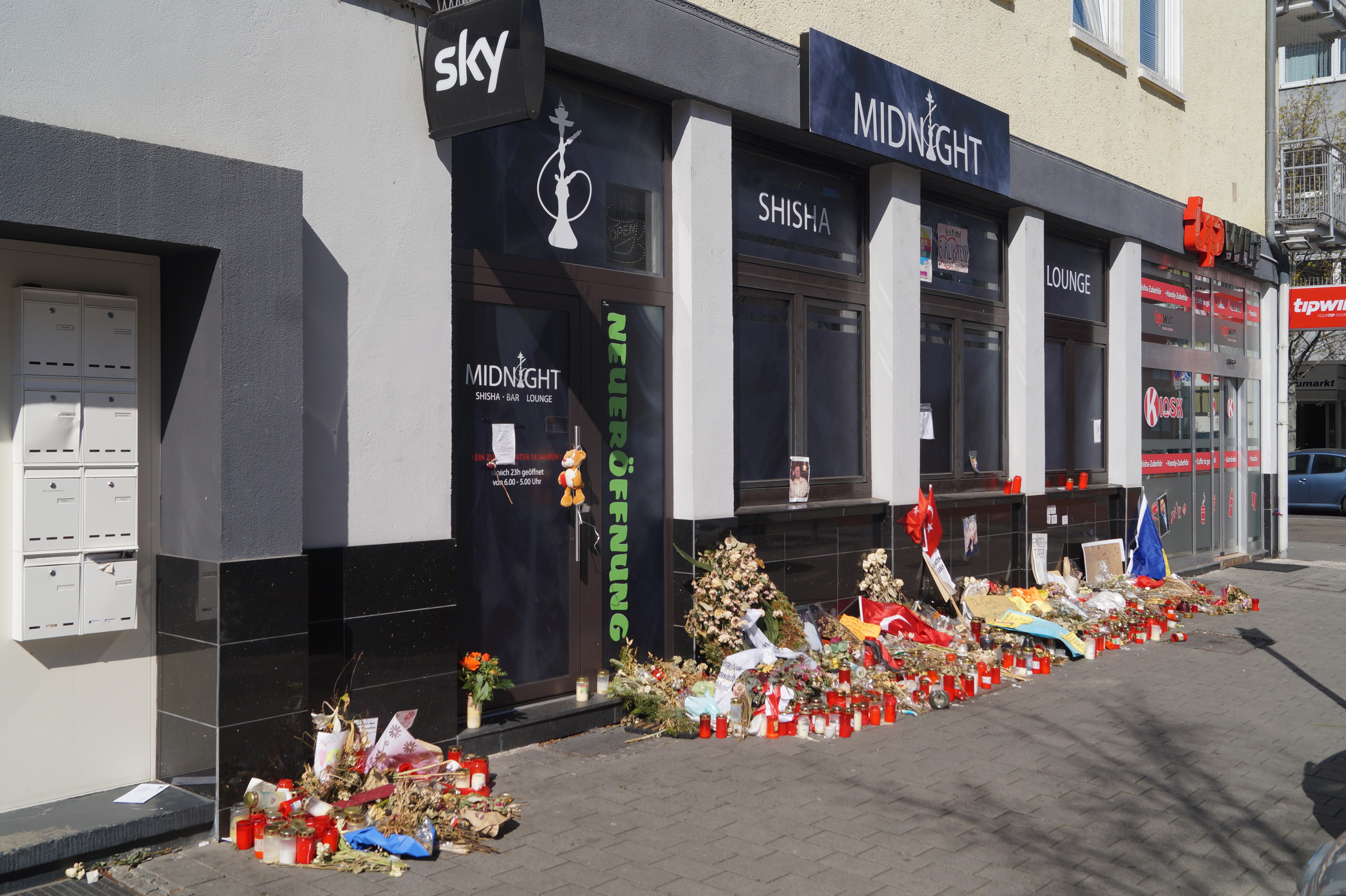 Kränze, Blumen (leider schon leicht verwelkt) und Kerzen am Tatort Heumarkt in Hanau 2020.